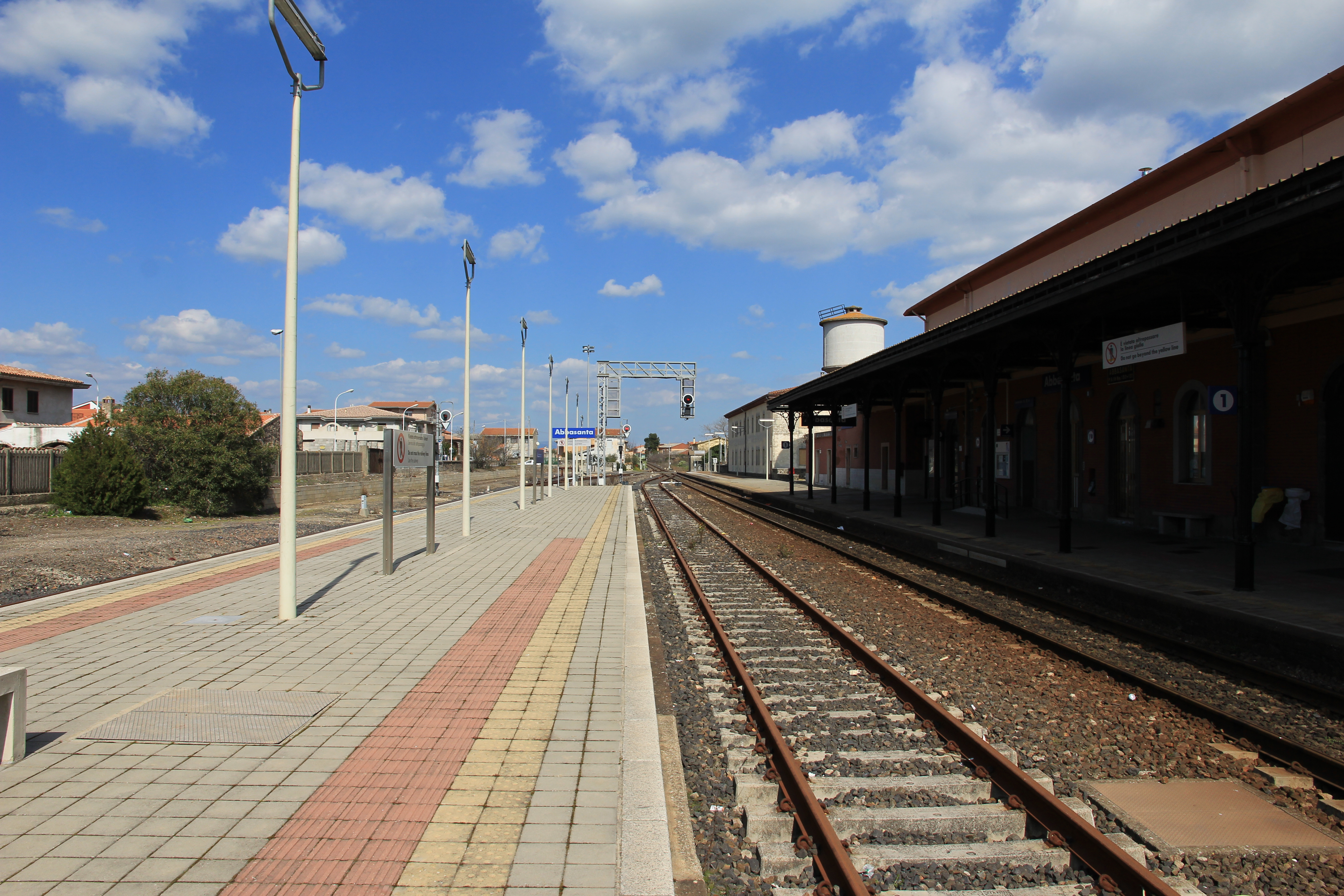 Abbasanta - Stazione ferroviaria